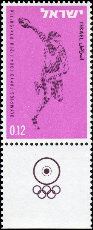 בול - ישראל באולימפיאדת טוקיו (1964)